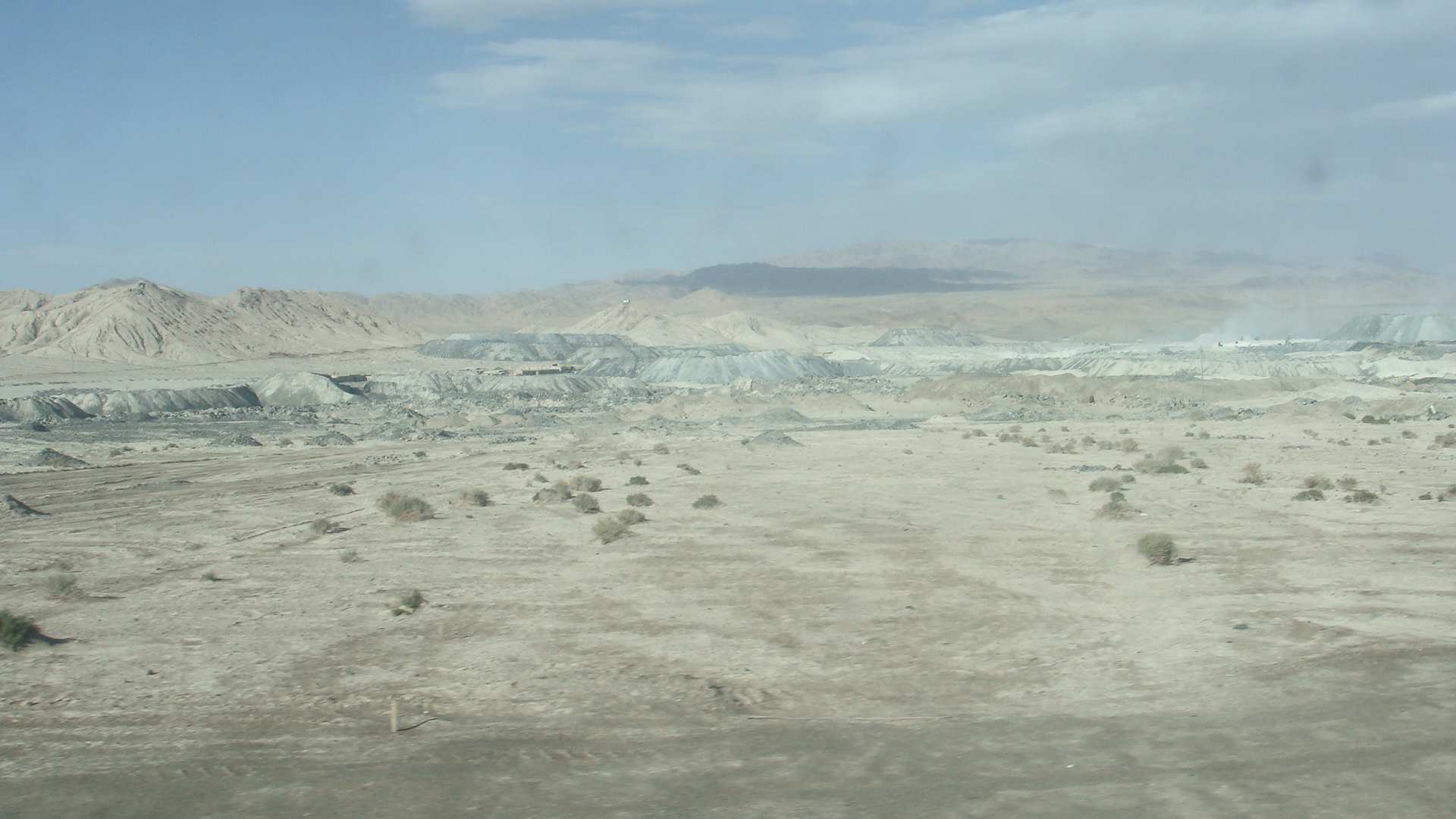 中国青海茫崖镇石棉矿 China Qinghai Mangya asbestos mining China Xinjiang Urumqi Welcome you to tour the, Китай Синьцзяна Урумчи приветствовать Вас на экскурсию, الصين ترحب زيارتك لاورومتشى فى شينجيانغ, 中国新疆のウルムチへの訪問を歓迎する, 中国新疆乌鲁木齐欢迎您来观光旅游